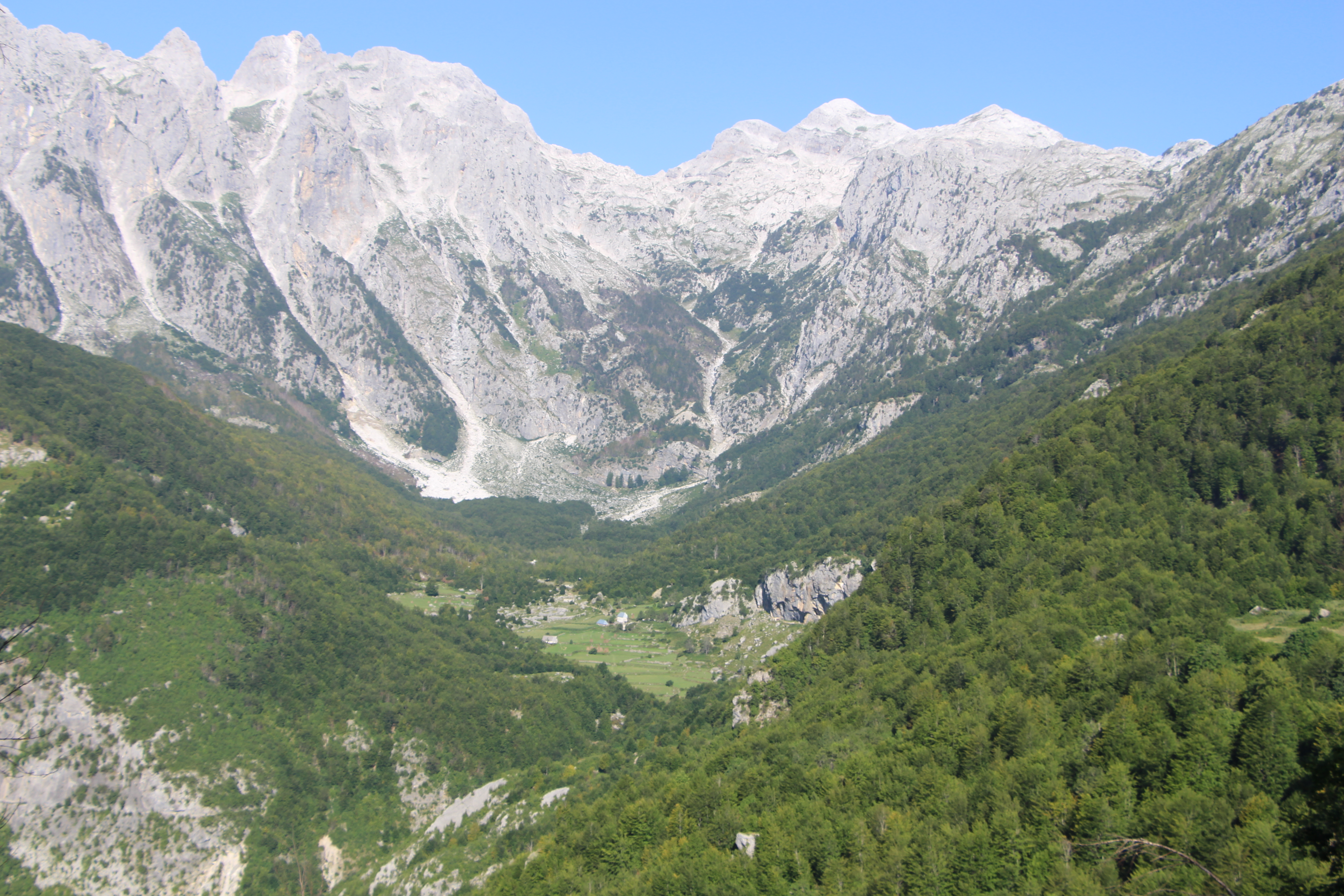 Fshati Vrane kufizohet me Currajt e Eper dhe zonen e Dugagjinit.